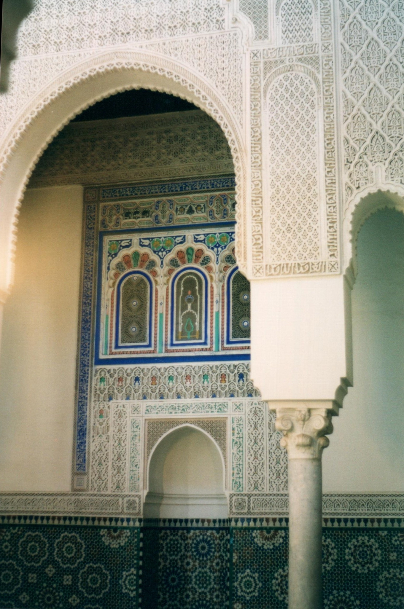 Mausoleo di Moulay Ismail, Meknes, Marocco - particolare dell'interno.